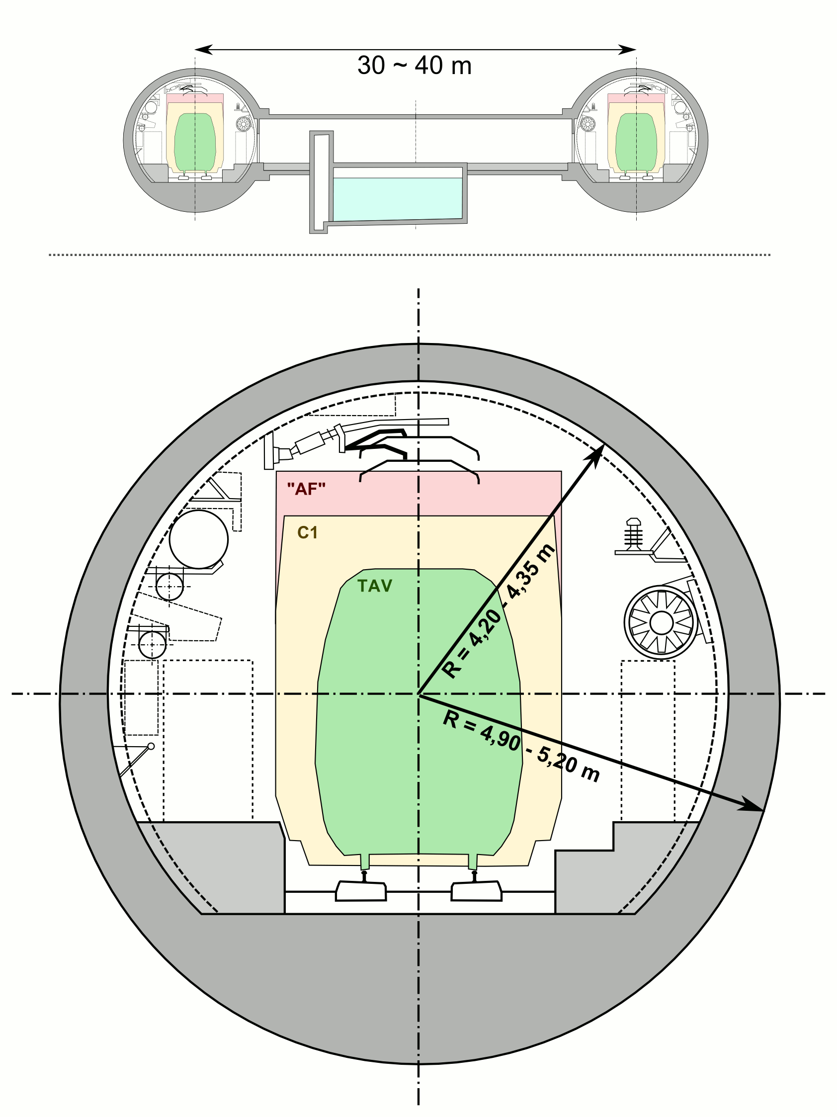 Sezione tipo di galleria della Nuova Linea Torino Lione